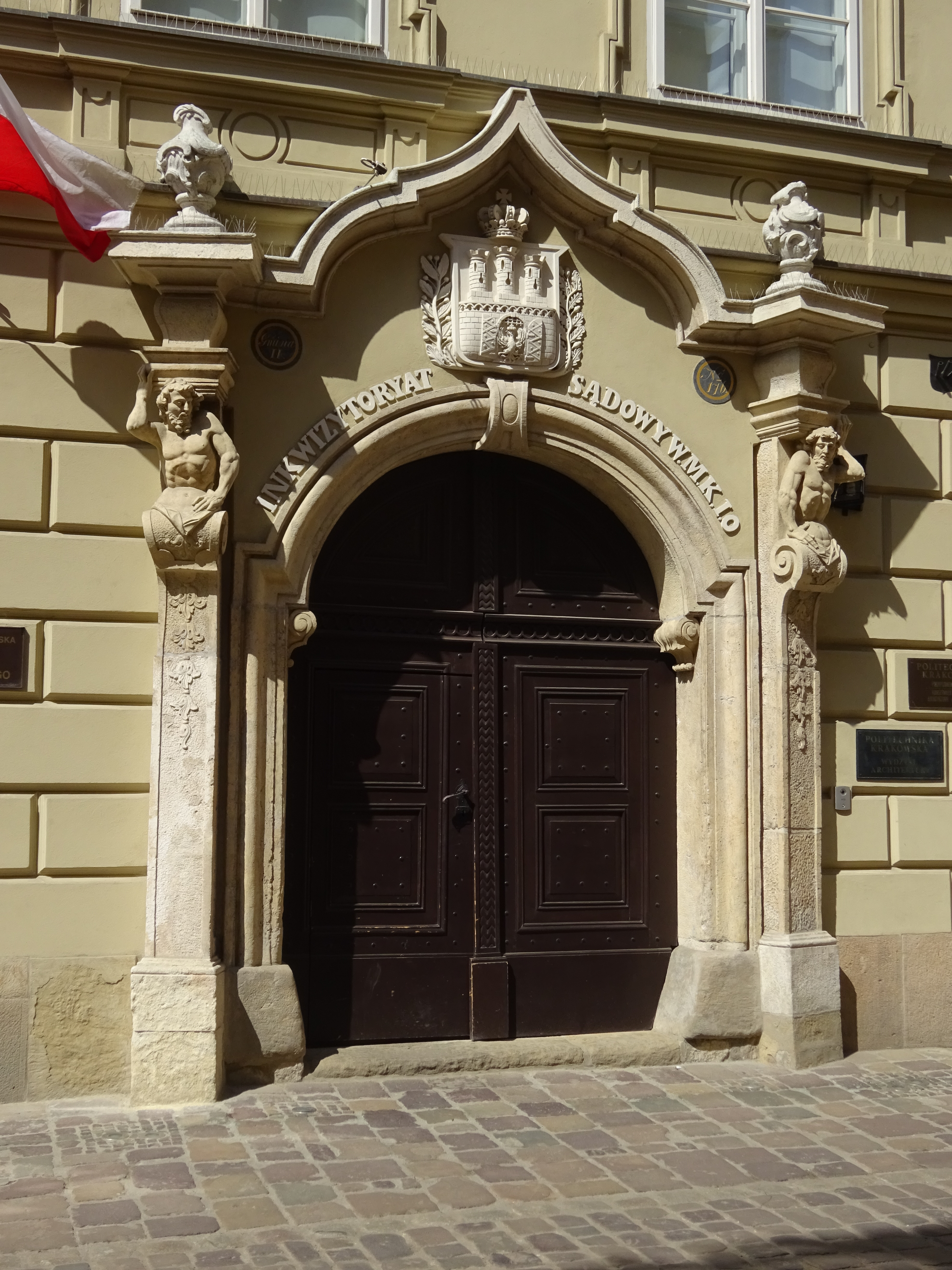 Portal Pałacu Samuela Maciejowskiego od strony ulicy Kanoniczej - numer 1 w Krakowie.